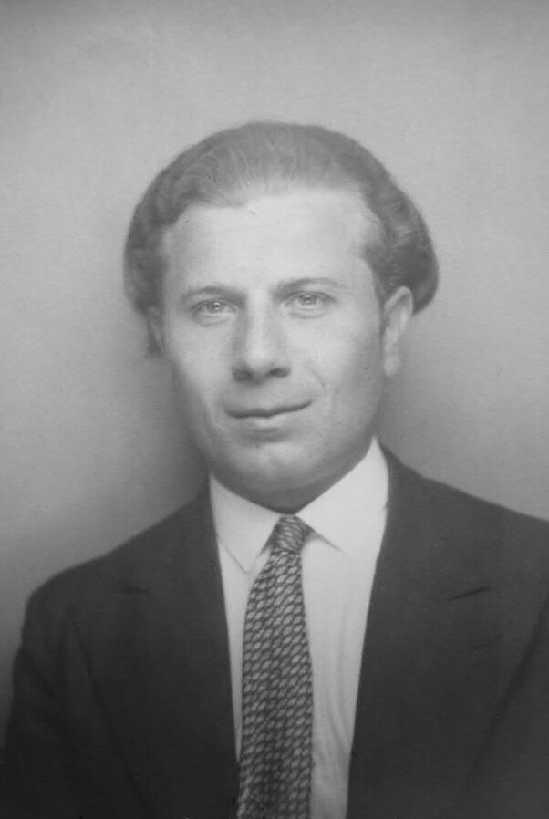 Portrait de František Kardaus (daté de 1939)